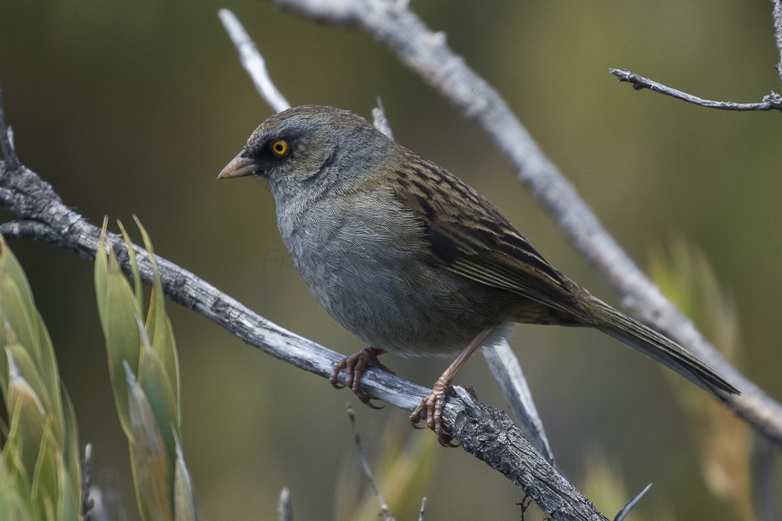 Volcano Junco - Cerro de la Muerte - Costa Rica_MG_6764